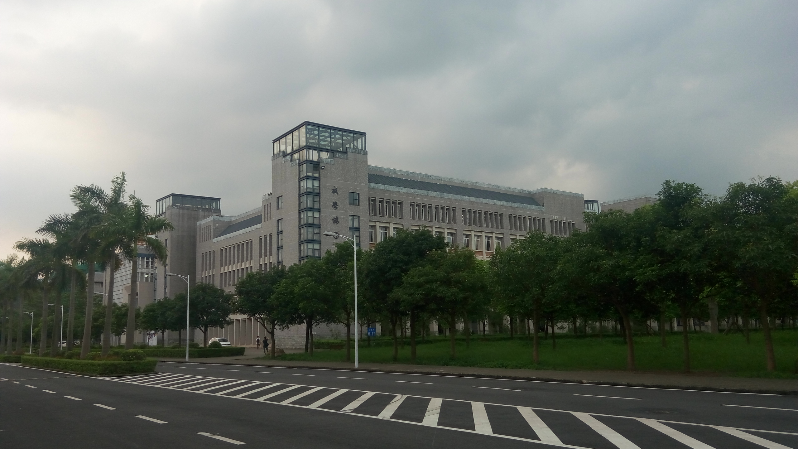 中文（中国大陆）: 广东南华工商职业学院教学楼